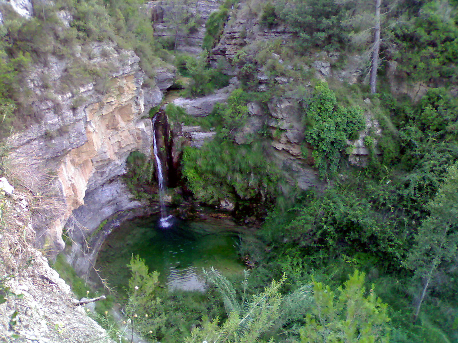 Vista del salto de la novia desde la nueva terraza/mirador Valencia España